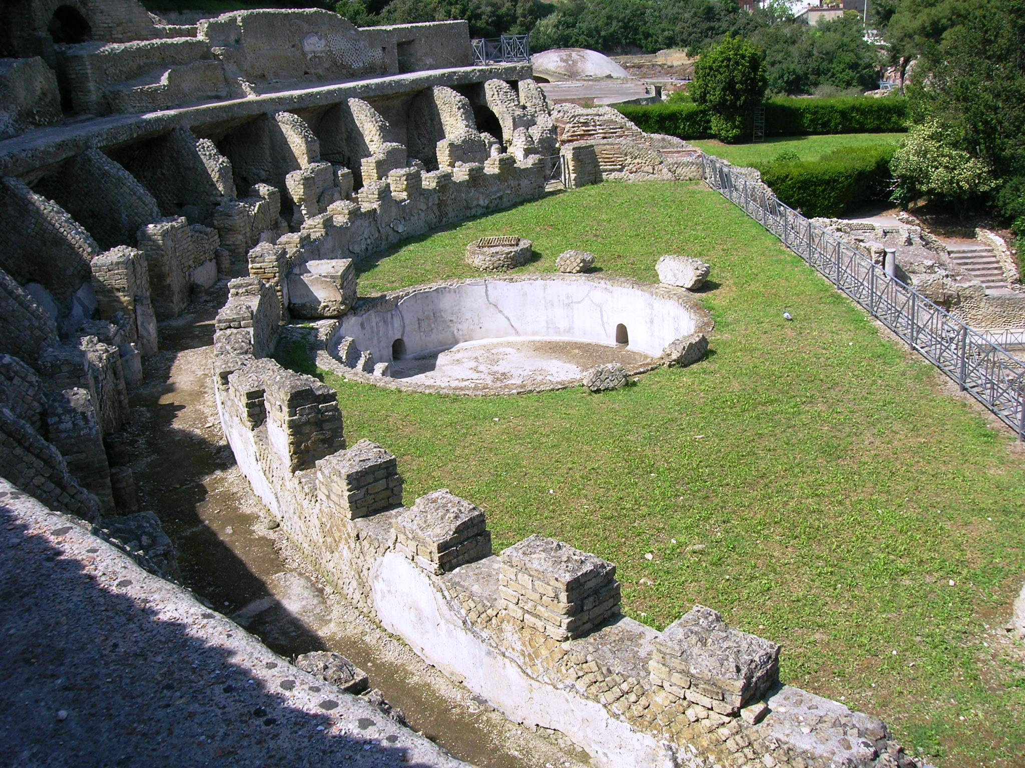 Il settore di Sosandra a Baia